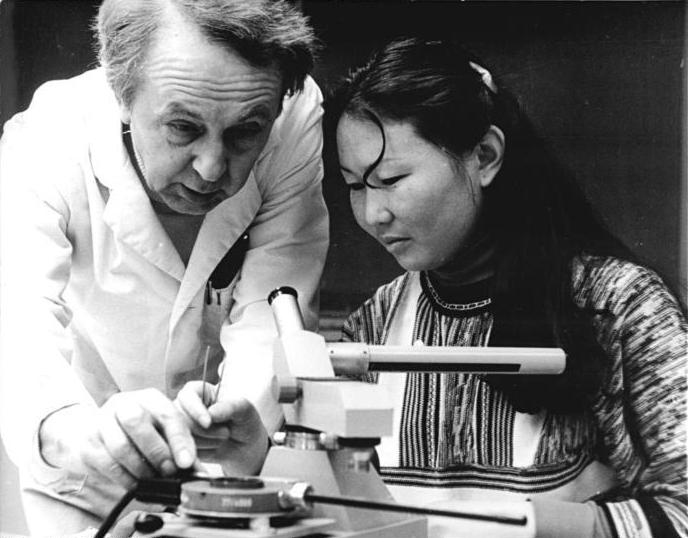 Leipzig, Universität, Physiklabor ADN-ZB Grubitzsch 2.2.83 Leipzig: Karl-Marx-Universität-Tungalagsaichan Padsuren (r.) aus der Mongolischen Volksrepublik absolviert mit ihren Kommilitonen bei Fritz Tomschke (l.), Lehrer im Hochschuldienst, ein Einführungspraktikum an der Sektion Physik. Zur Zeit sind an der Leipziger Alma mater 12000 Studenten immatrikuliert. Die Bildungseinrichtung begeht im Karl-Marx-Jahr ihr 30jähriges Jubiläum.